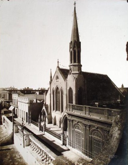 Vista del templo de la Iglesia Metodista en la calle Corrientes de la ciudad de Buenos Aires. El edificio, inaugurado en 1874, sigue en pie a pesar del ensanche de la avenida en 1936, durante el cual fueron demolidas todas las construcciones en su entorno.